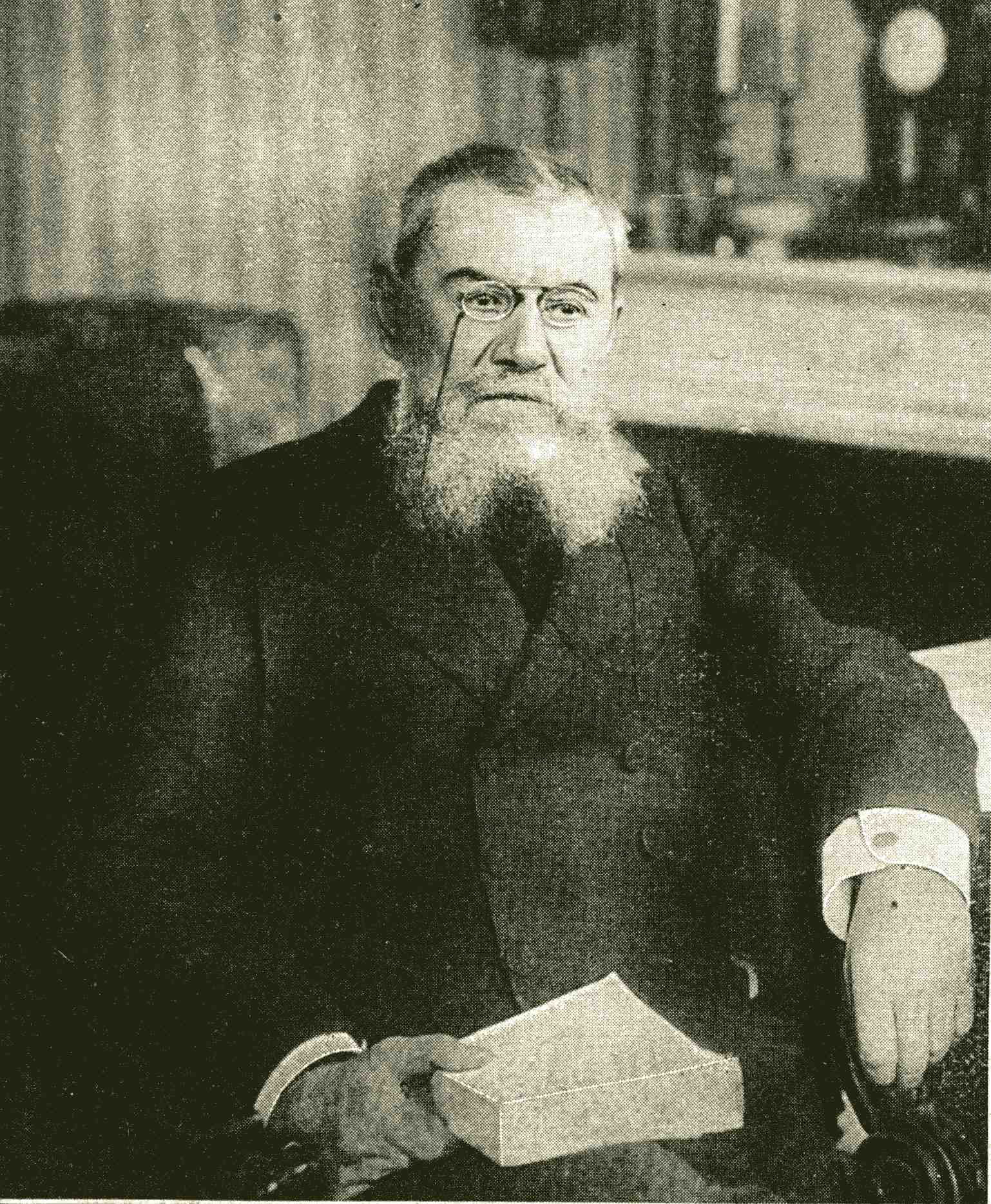 Pierre de la Gorce, élu à l'Académie française